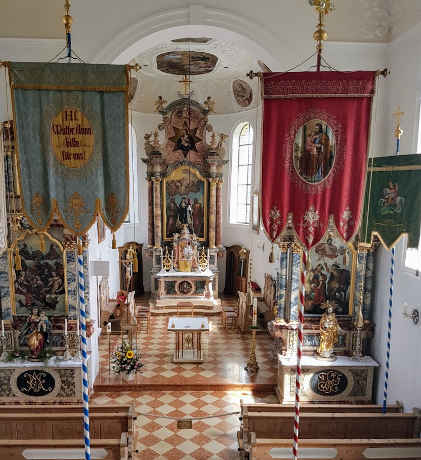 Innenraum mit Choraltar und Prozessionsfahnen der Kirche "St. Walburga, Philippus und Jakobus" (2017)